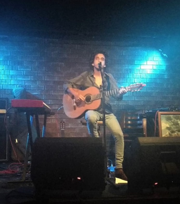 דוד שאול מופיע במועדון האוזן בר שבתל אביב, 2018